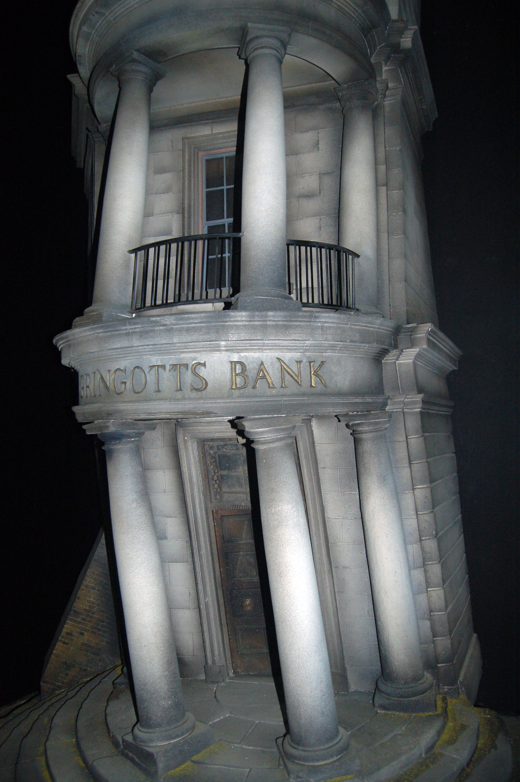 Gringotts Bank